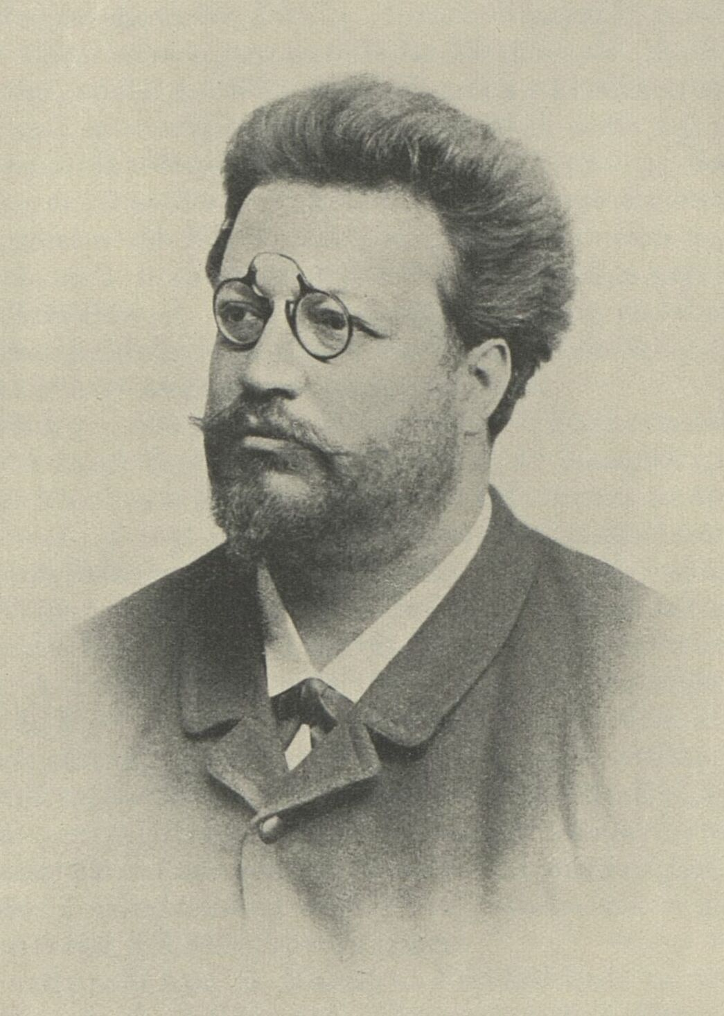 Mladší bratr Tomáše Garrigue Masaryka